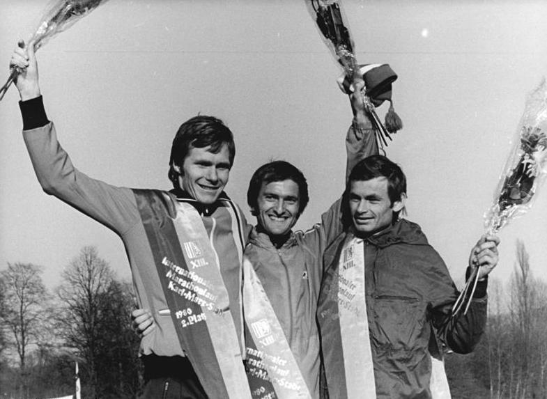 ADN-ZB Thieme 3.5.80 Karl-Marx-Stadt: 13. Internationaler Marathonlauf. Der Olympiasieger von 1976 Waldemar Cierpinski (SC Chemie Halle, mitte) gewann die 42,195 km in der Streckenrekordzeit von 2:11:17 St. Den zweiten Platz belegte der Norweger Oeywind Dal (links), vor Joachim Truppe (SC Motor Jena, rechts).